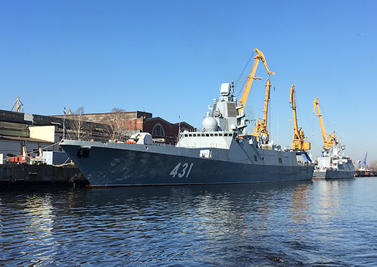 «Адмирал флота Касатонов» — российский сторожевой корабль (фрегат) дальней морской зоны проекта 22350 у достроечной набережной предприятия «Северная верфь» (Санкт-Петербург)